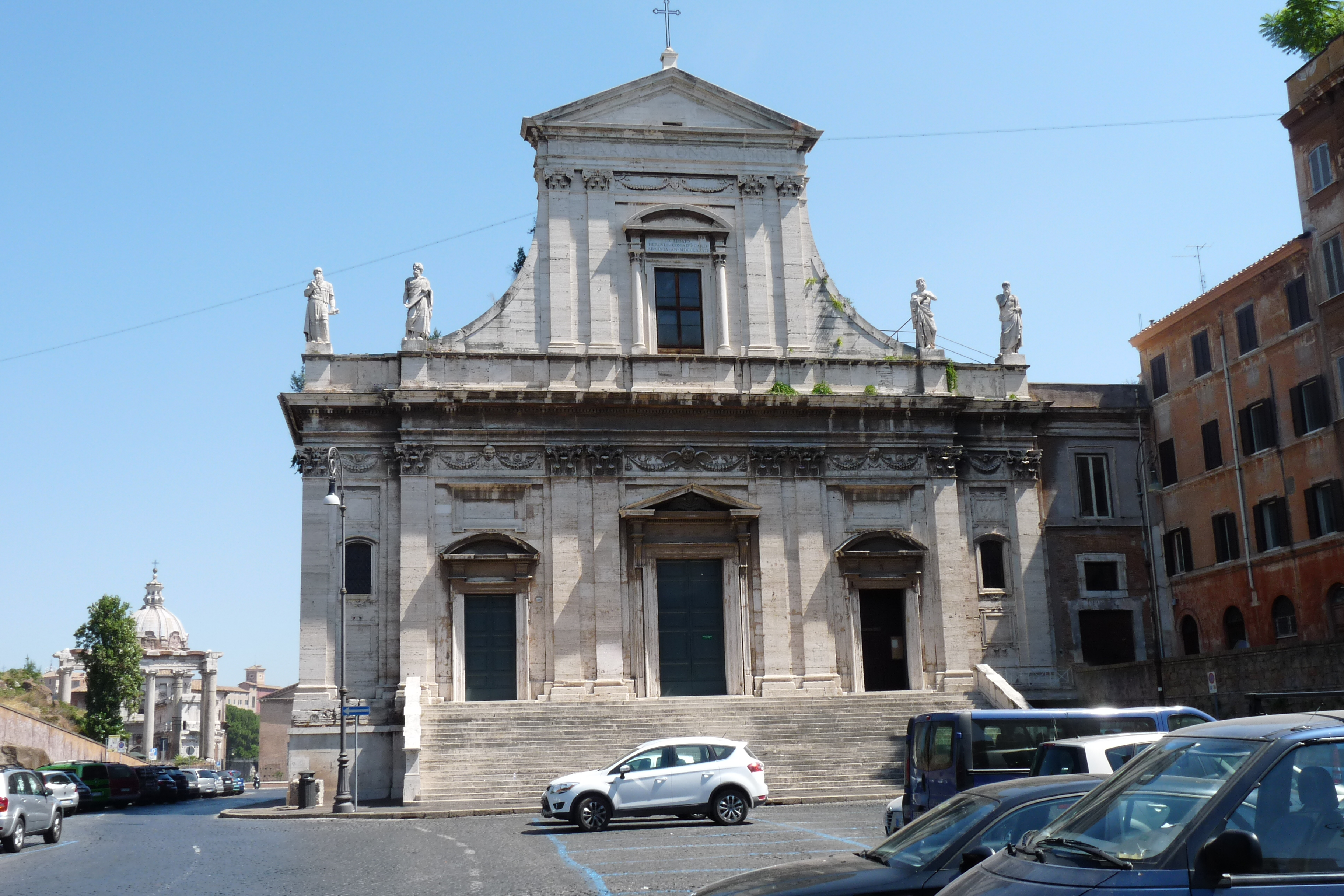 Santa Maria della Consolazione Roma - exterior